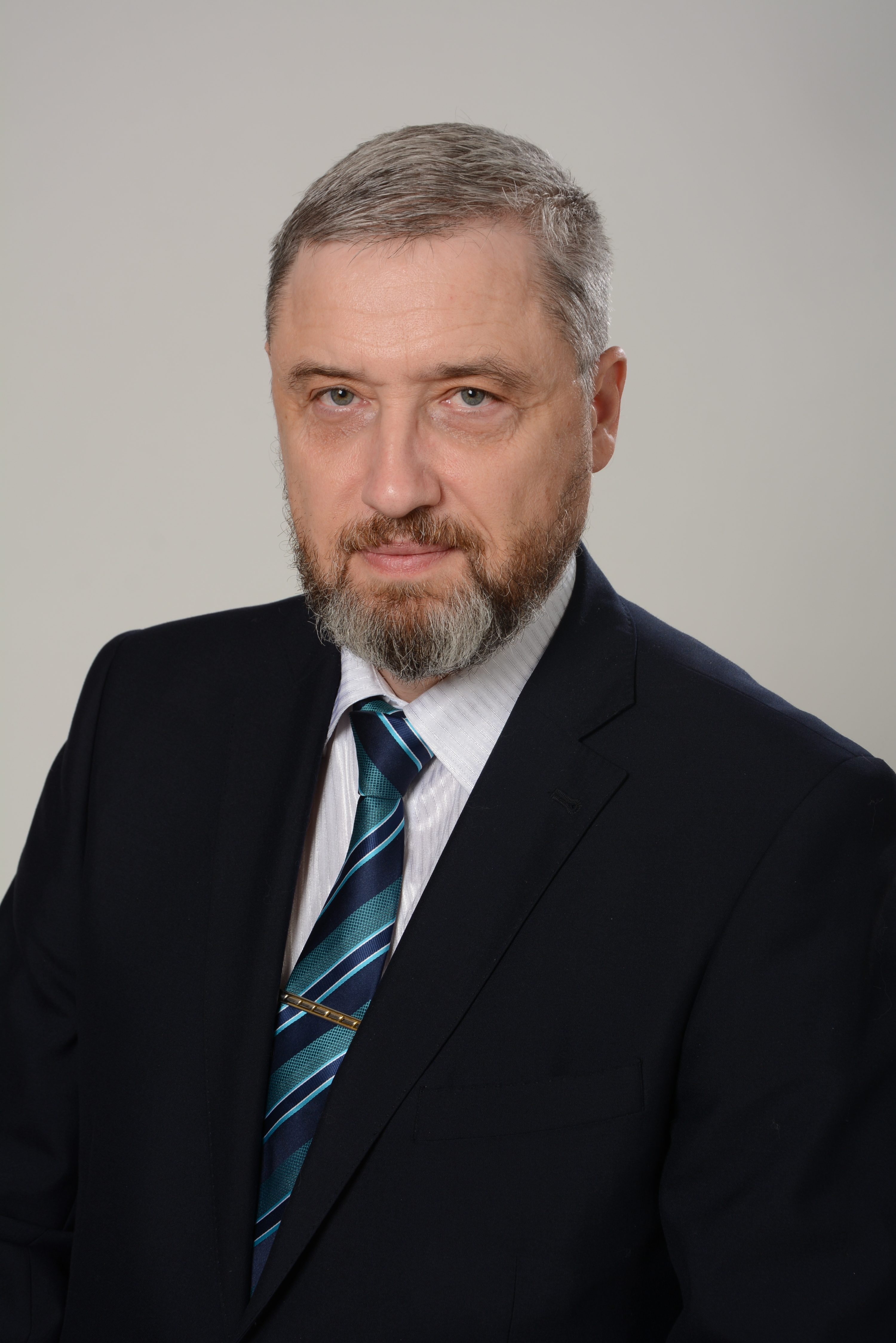 Сергей Григорьевич Сизов (Омск, 2017). Русский историк.